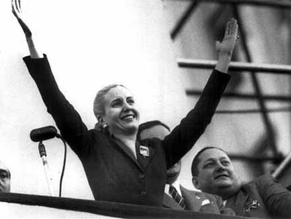 Evita, durante la proclamación de la fórmula Perón-Eva Perón